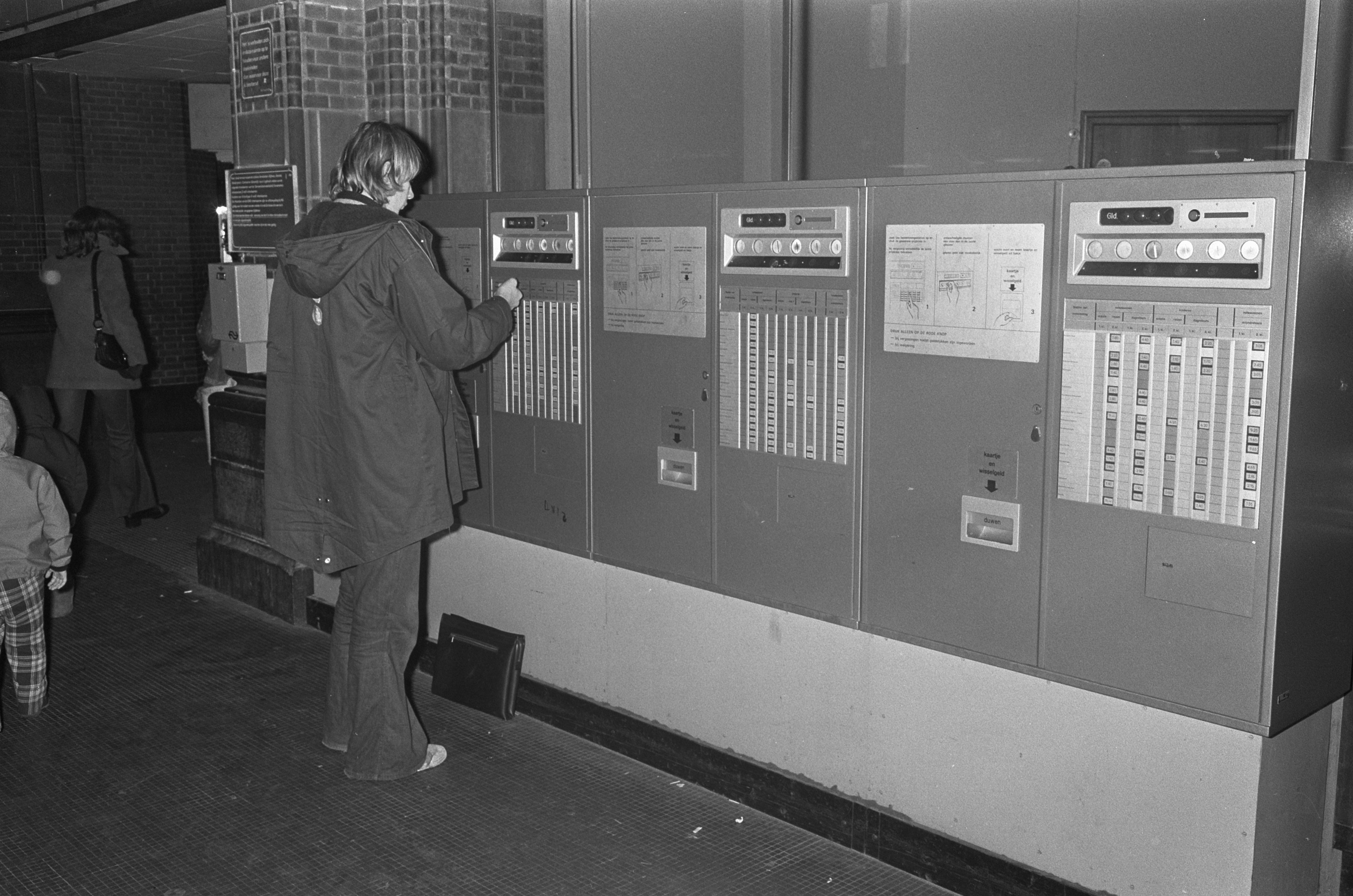 Collectie / Archief : Fotocollectie Anefo Reportage / Serie : Centraal Station Amsterdam wordt voorbereid op te verwachten drukte met het oog op de komende benzinedistributie Beschrijving : Kaartjesautomaten Datum : 4 januari 1974 Locatie : Amsterdam, Noord-Holland Trefwoorden : kaartjesautomaten, openbaar vervoer, stations Fotograaf : Rob Croes / Anefo Auteursrechthebbende : Nationaal Archief Materiaalsoort : Negatief (zwart/wit) Nummer archiefinventaris : bekijk toegang 2.24.01.05 Bestanddeelnummer : 926-9174